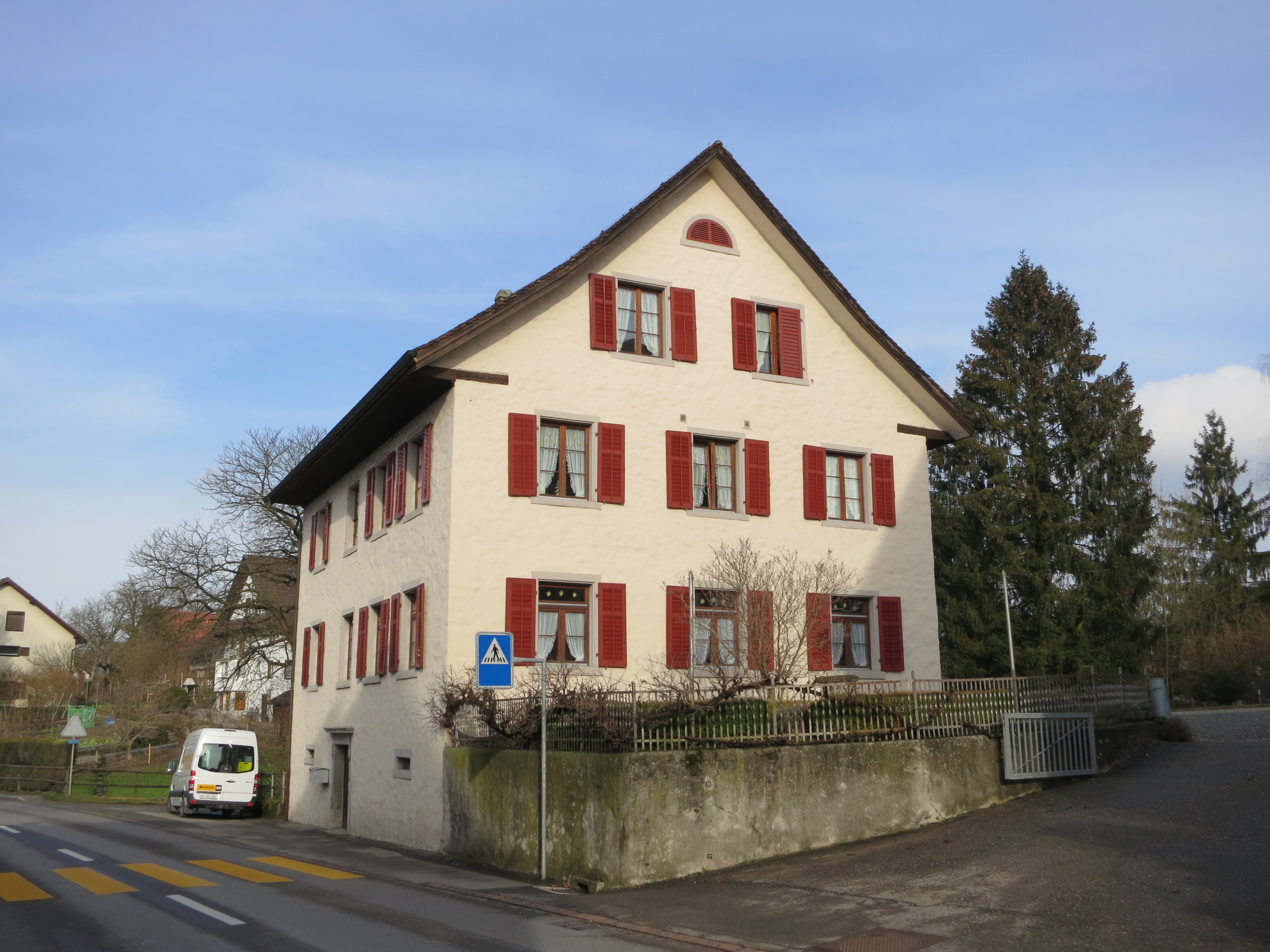 Chilehuus, Ottenbach ZH, Schweiz